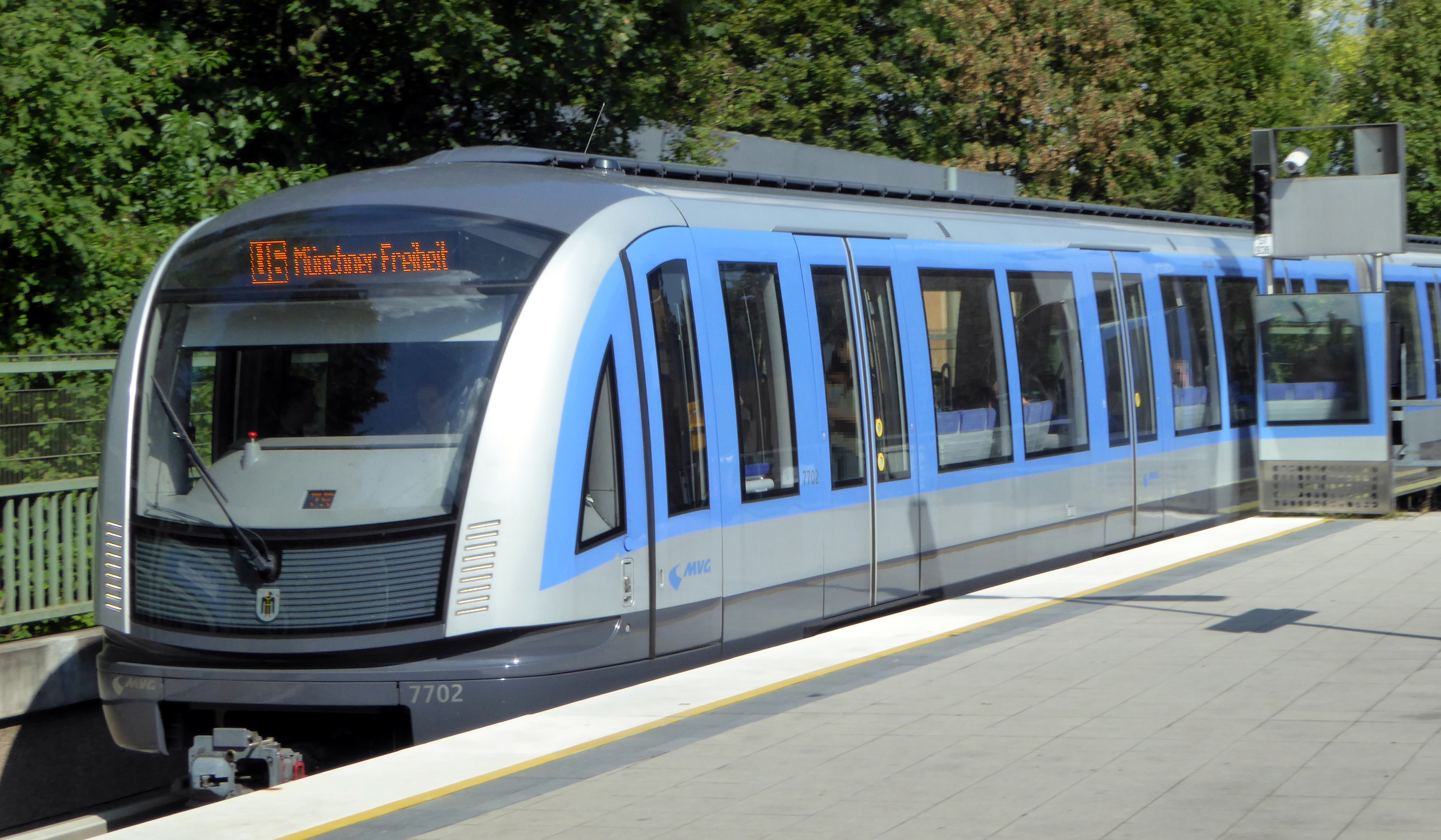 Ein C2-Zug der Münchner U-Bahn, erkennbar unter Anderem an den Frontleuchten, fährt in den Bahnhof Studentenstadt ein.